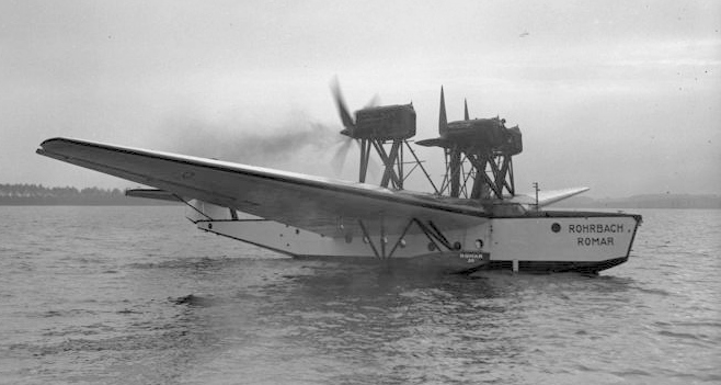 Der erste Start des Rohrbach-Flugbootes "Romar" bei Travemünde.